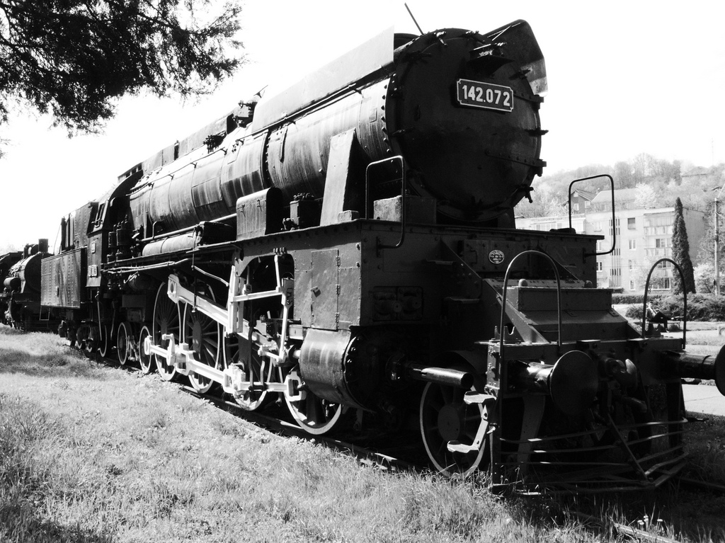 Resita locomotive museum.